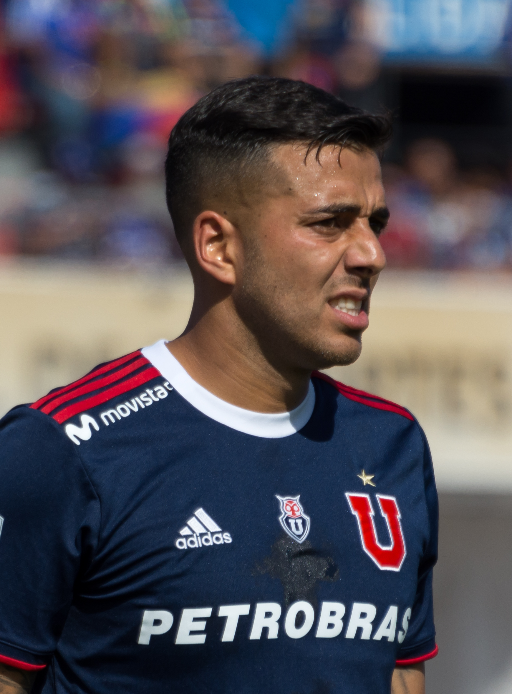 Matías Campos Toro, Universidad de Chile v Unión Española, Estadio Nacional Julio Martínez Prádanos, Ñuñoa, Santiago, Región Metropolitana, Chile.